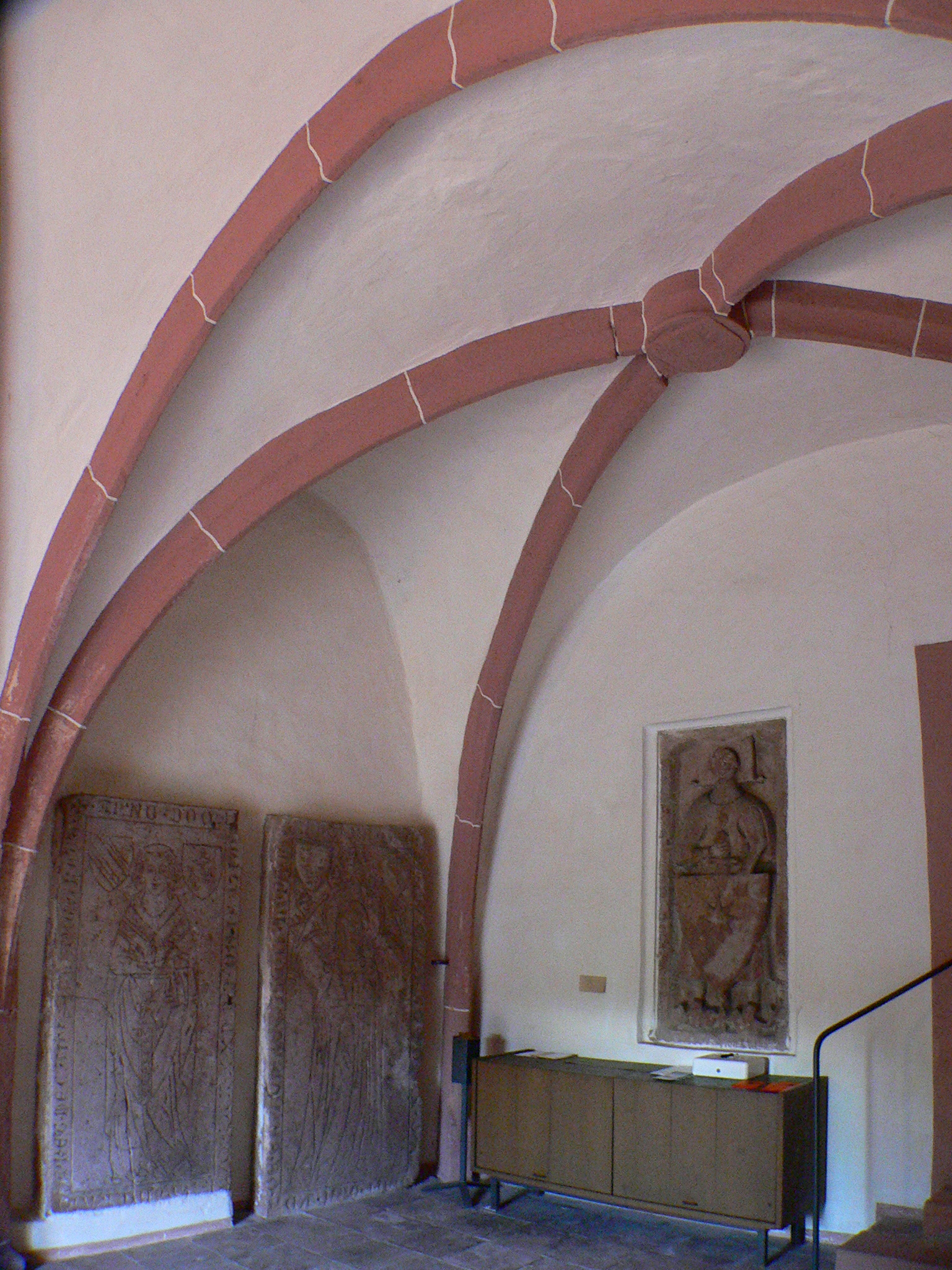 Kloster Höchst, Odenwald, Deutschland: Turmhalle der Klosterkirche